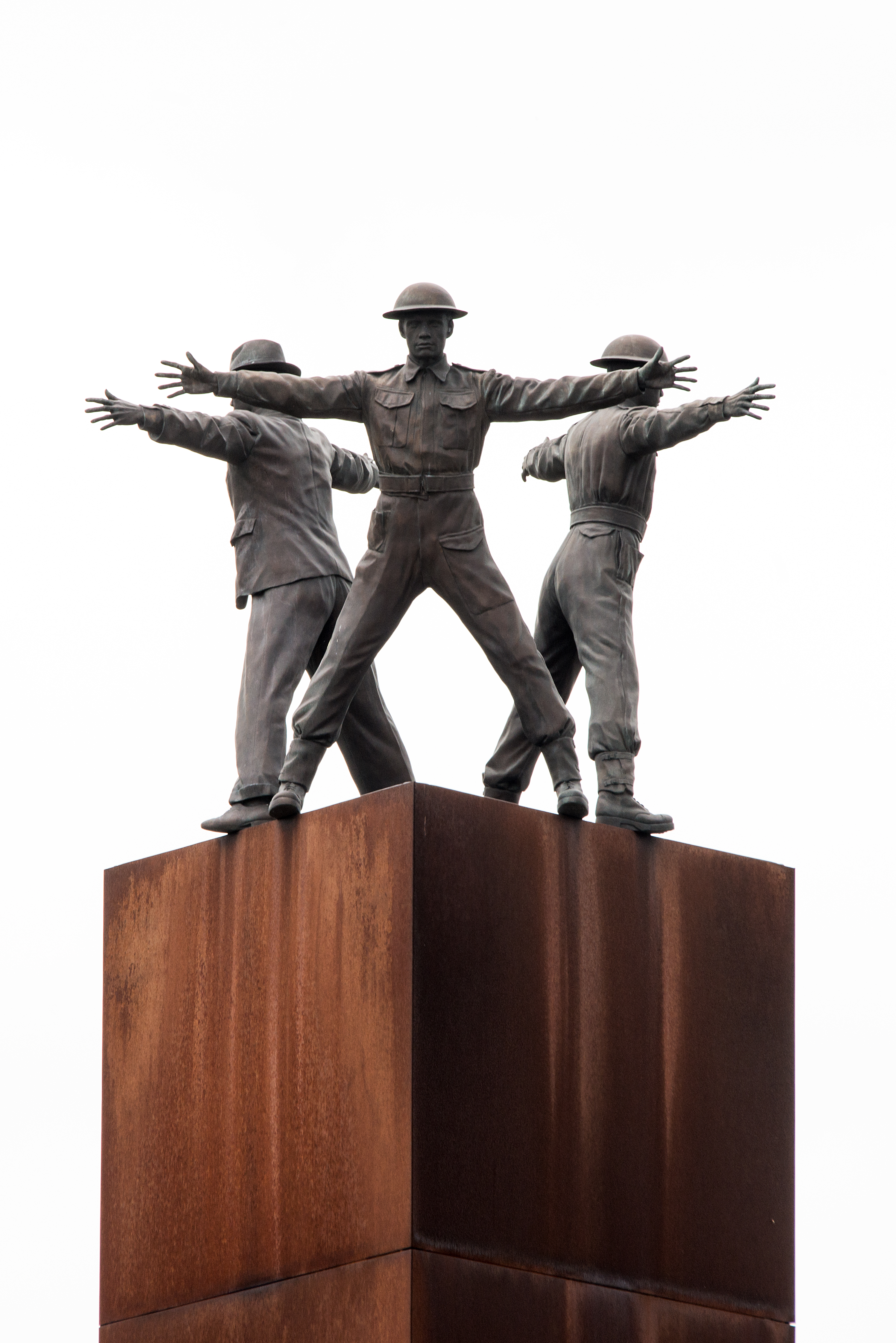 Denkmal der Operation Anthropoid Památník Operaci Anthropoid